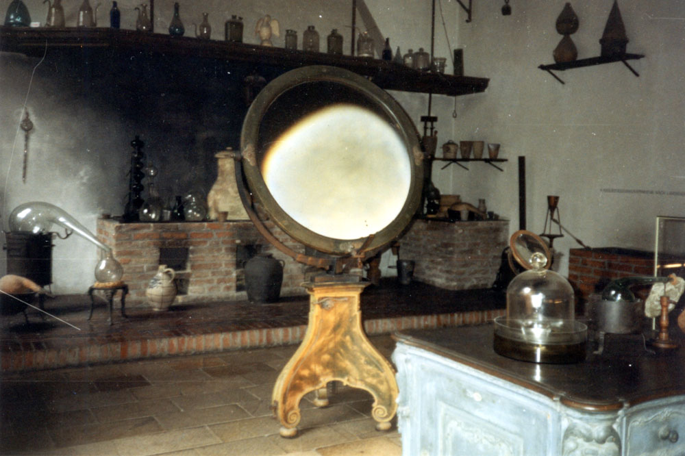 Brennspiegel im Deutschen Museum München.